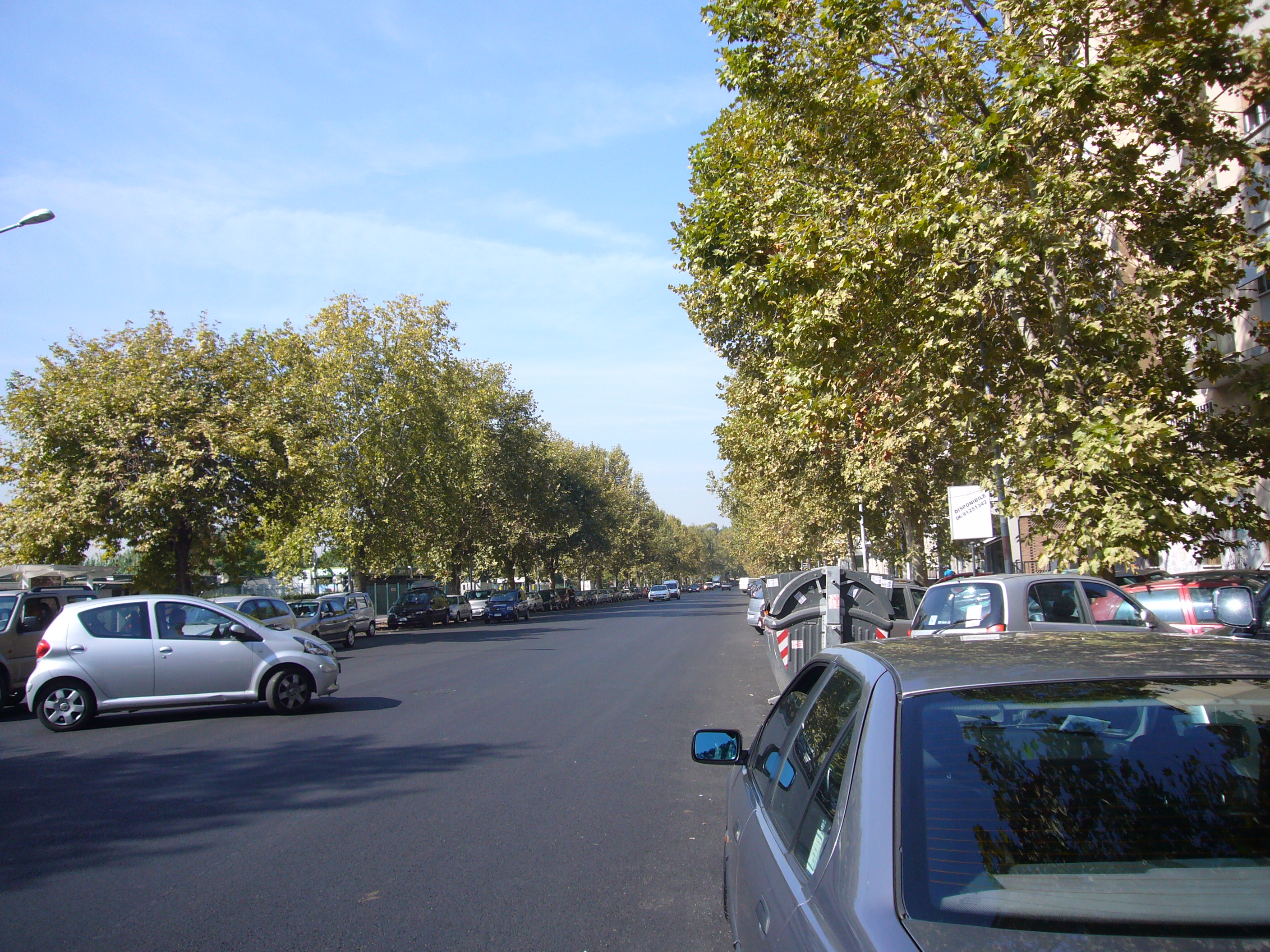 Roma, lungotevere degli Inventori da ponte Marconi